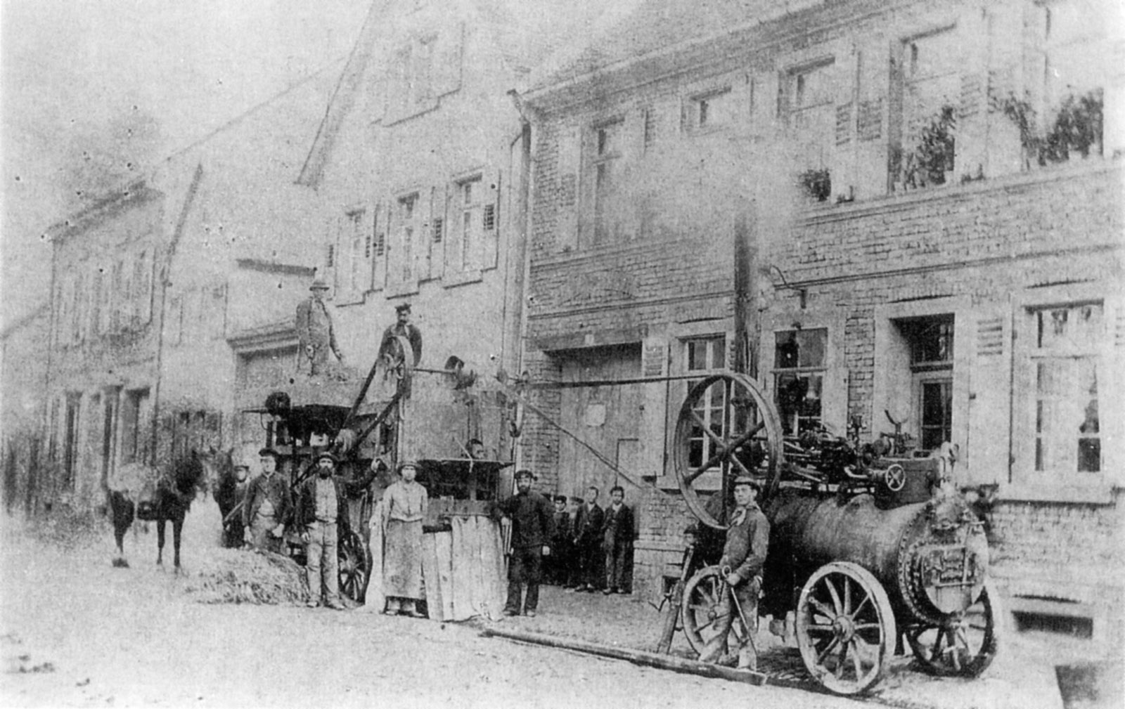 Der "Hesse-Drescher", die "erste Geerer Dreschmaschin" (ein Lokomobile) am Ende der 19. Jahrhunderts in der Darmstädter Straße. Die Maschine wurde von Michael Lämmermann sebst entwickelt und gebaut. Die Aufnahme entstand vor dem Haus Diehl und Schaffner.